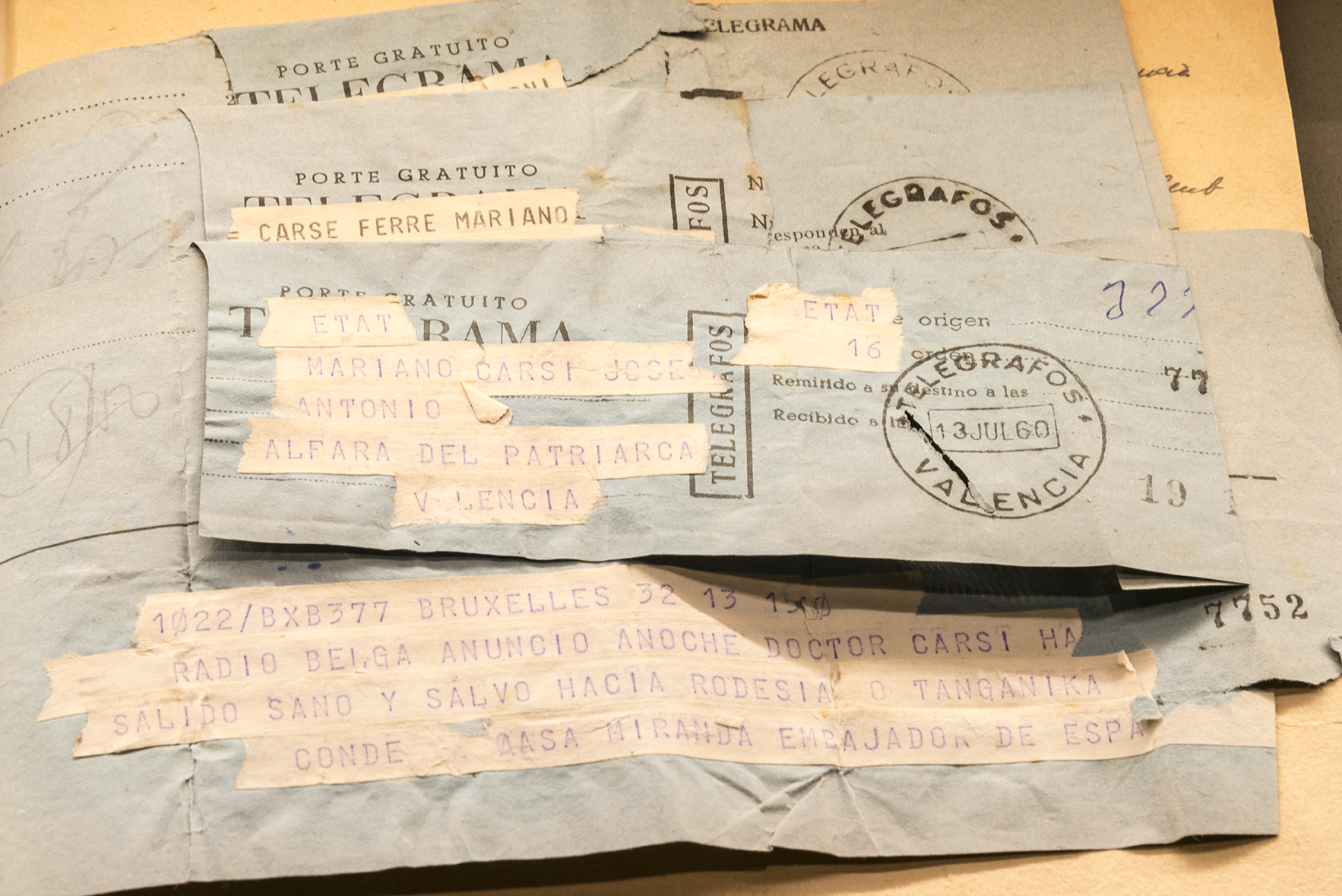 Exposició temporal "Doctor Carsí, supose?", dedicada a la col·lecció personal d'objectes de Mariano Carsí.